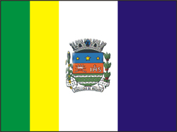 Brasão de Conceição de Macabu/RJ